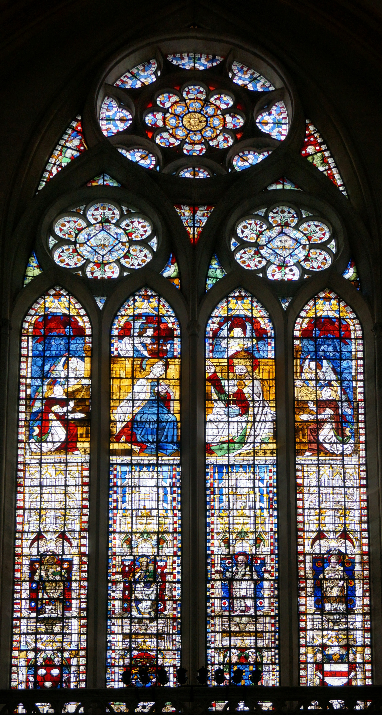 Vitrail de la Cathédrale Saint-Étienne de Toul, le Couronnement de la Vierge .